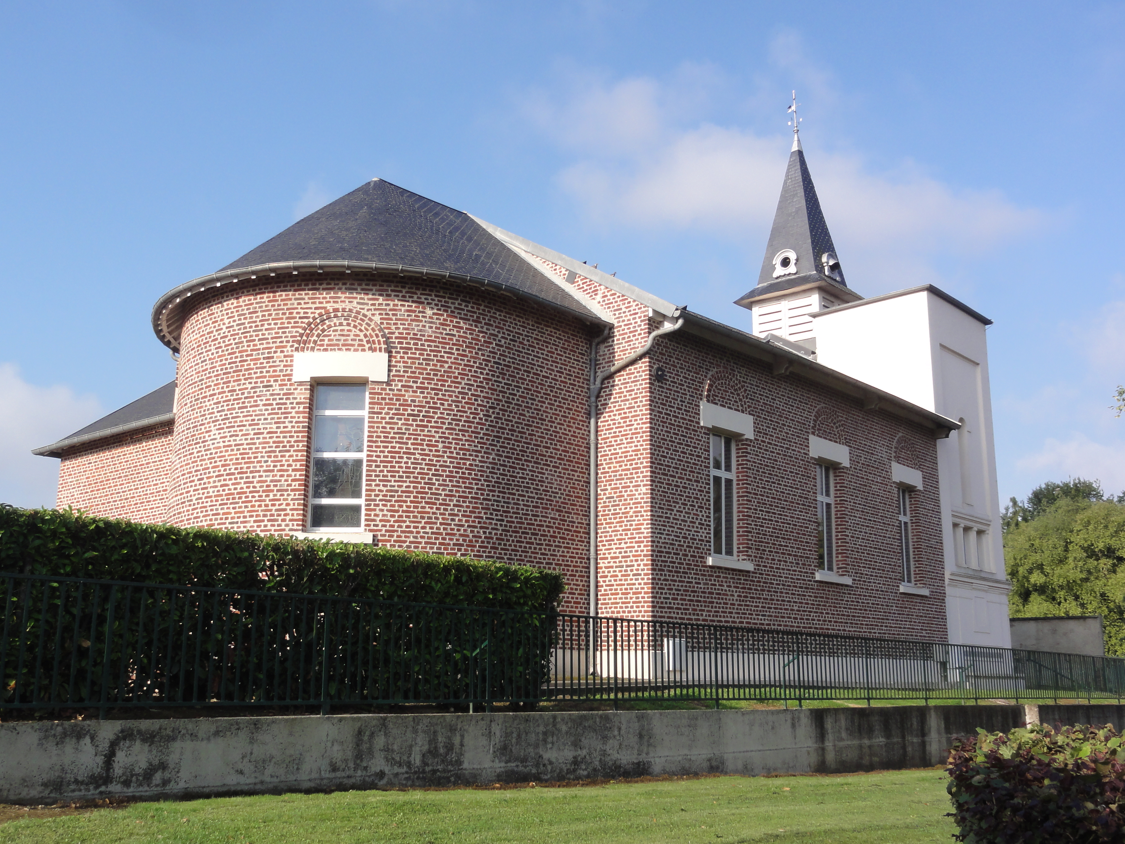 Harly (Aisne) église